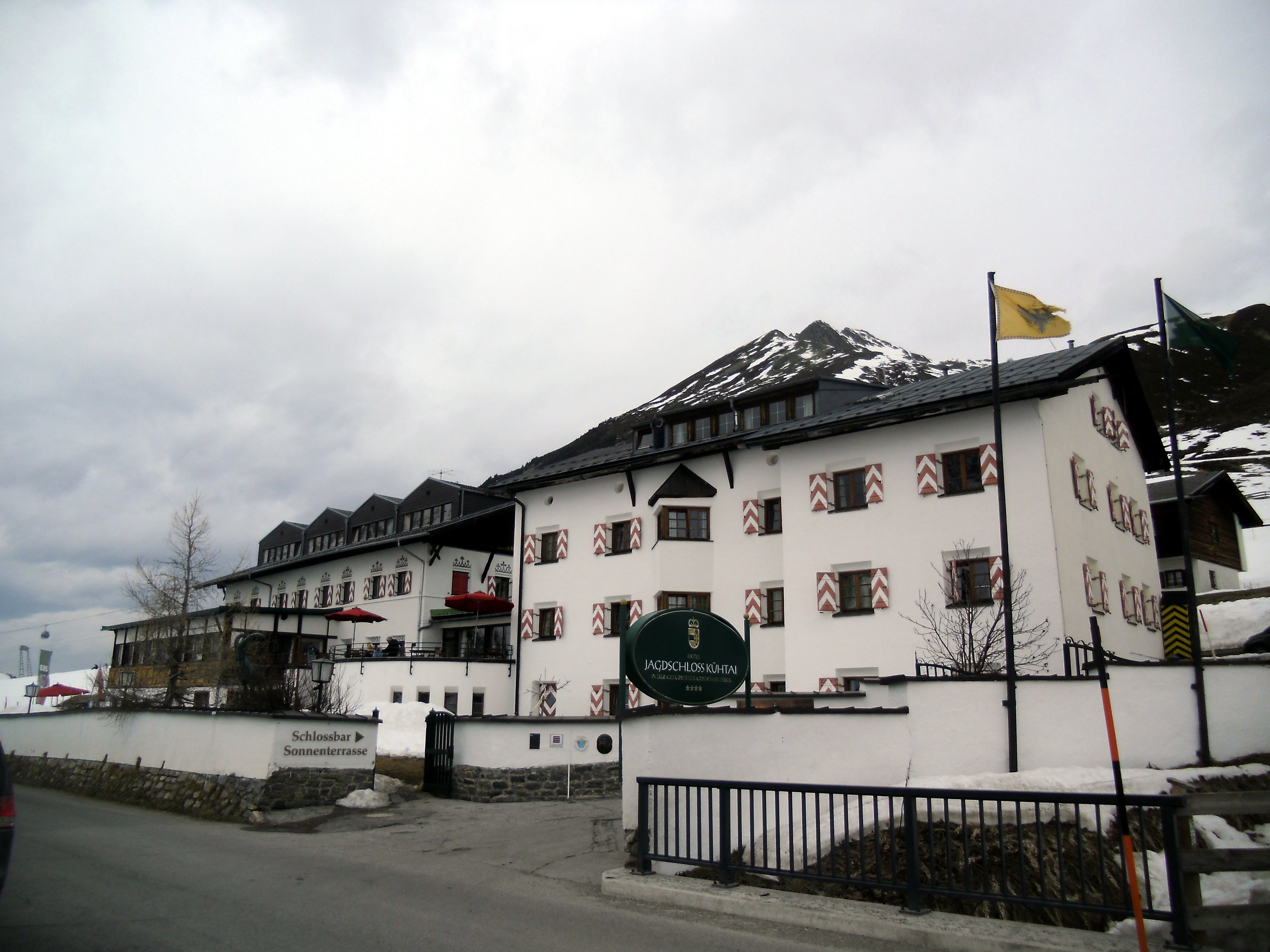 Ehem. Jagdschloss Kühtai/Hotel